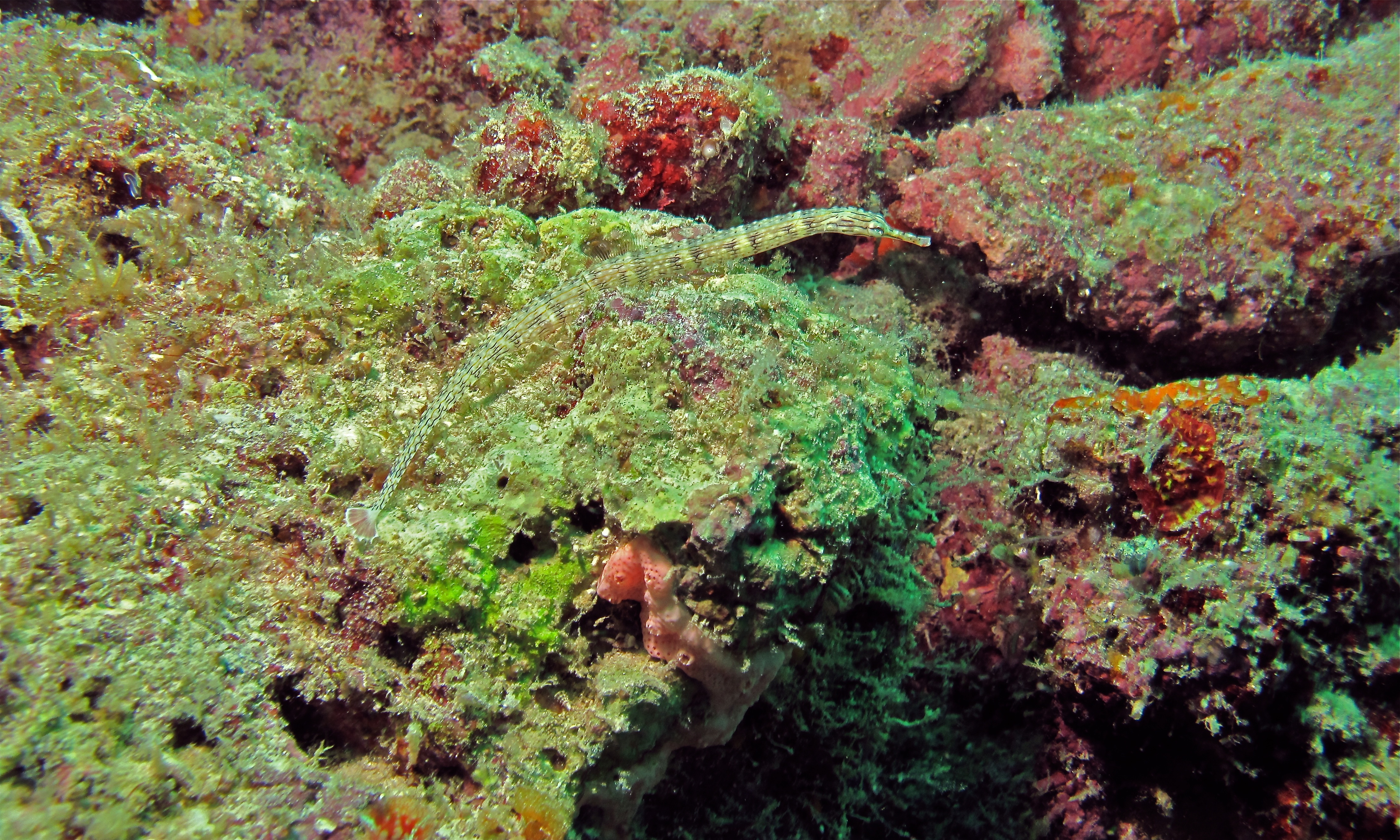 House Reef, Pulau Kapalai, Sabah, MALAYSIA